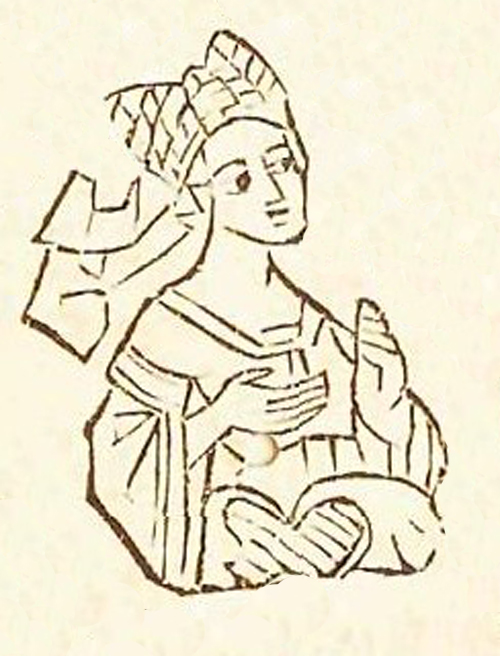 Alžběta Habsburská (1293-1352)